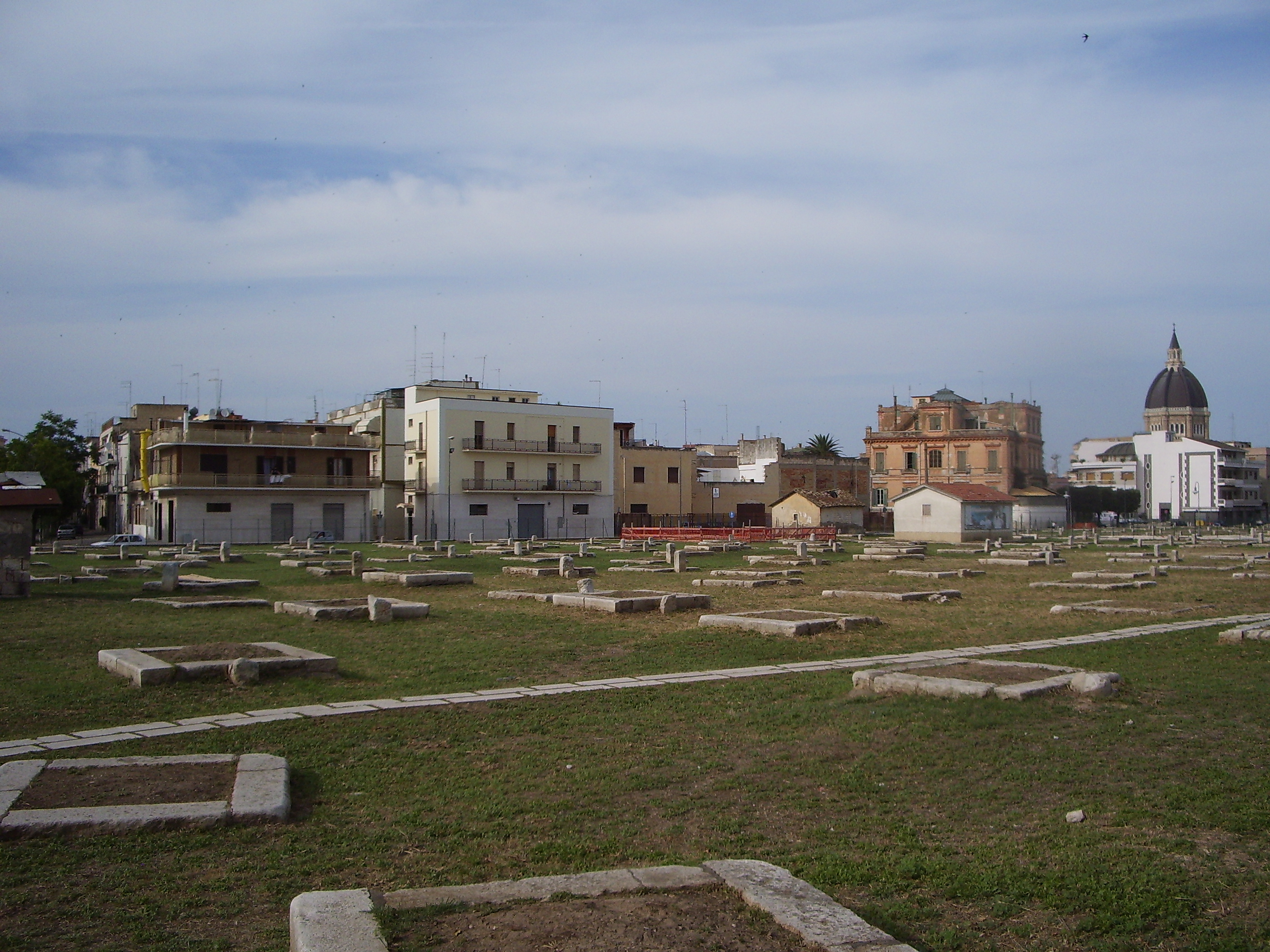 Veduta delle Fosse Granarie di Cerignola